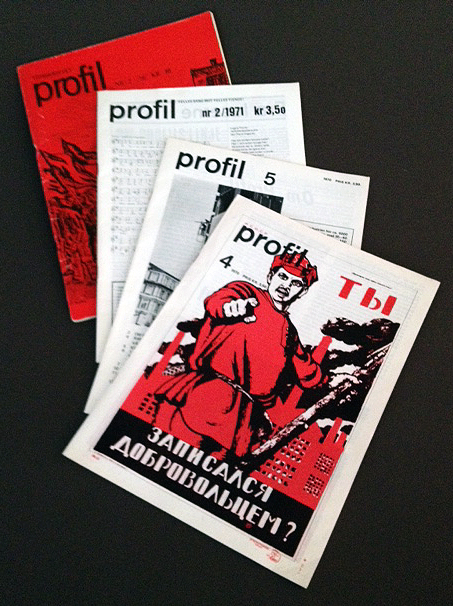 norsk kulturtidsskrift, slik det framsto på 1970-tallet